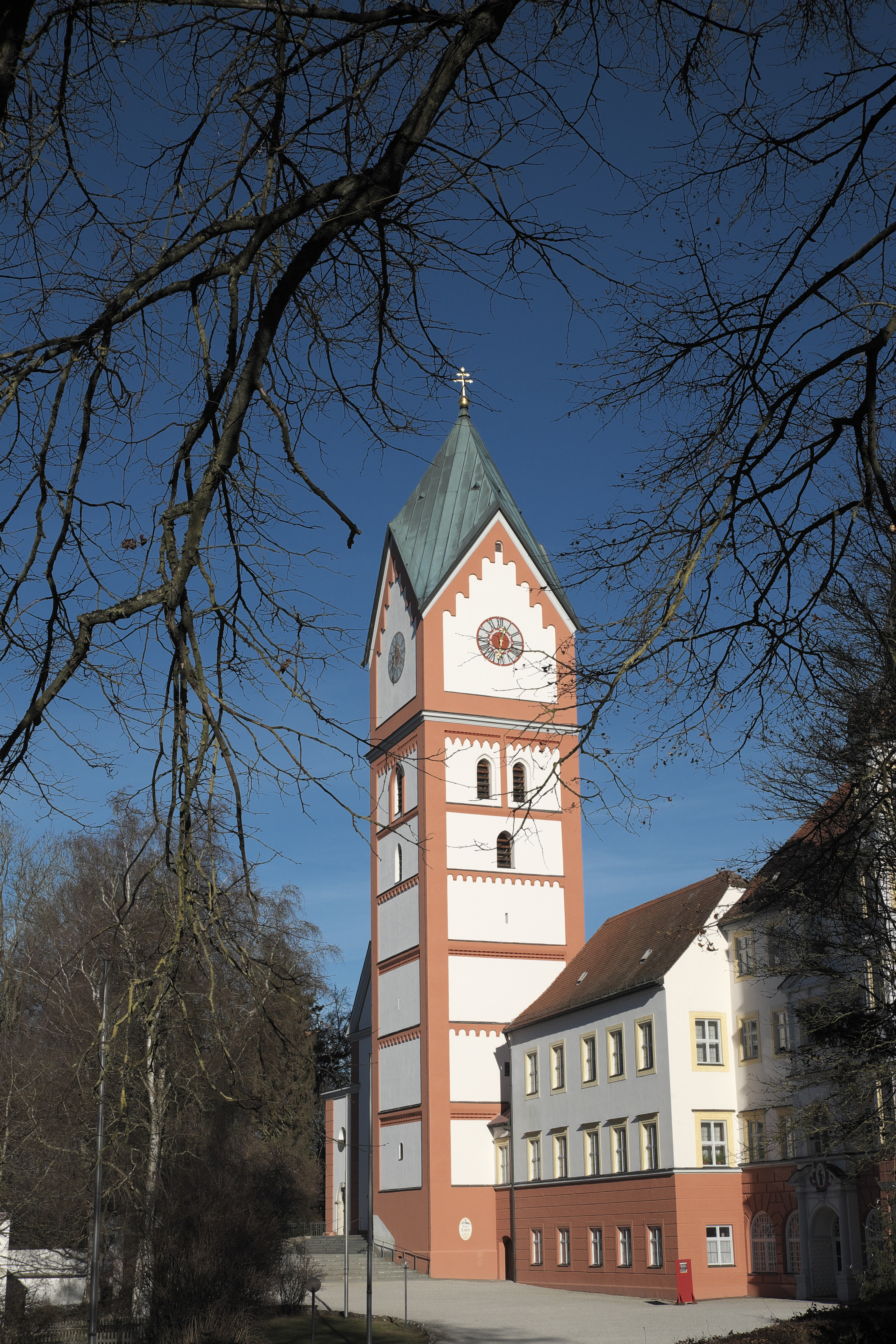 Katholische Pfarr- und Benediktinerabteikirche Mariä Himmelfahrt und des Heiligen Kreuzes des Klosters Scheyern in Scheyern im Landkreis Pfaffenhofen an der Ilm (Bayern/Deutschland), romanischer Turm mit neoromanischem Helm